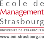 Logo Ecole de Management Strasbourg